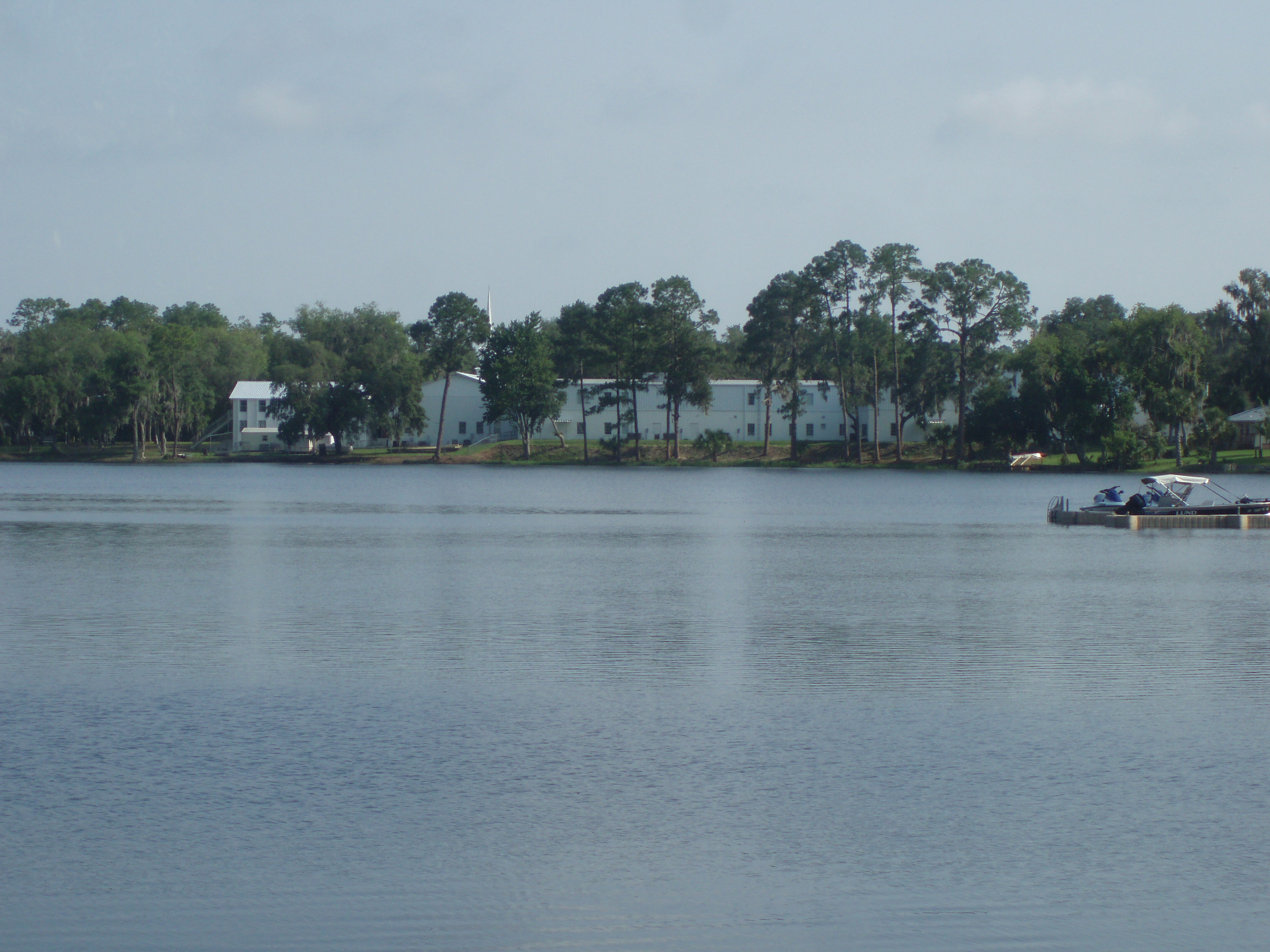 CHURCH LAKE (LYNNE, FL)